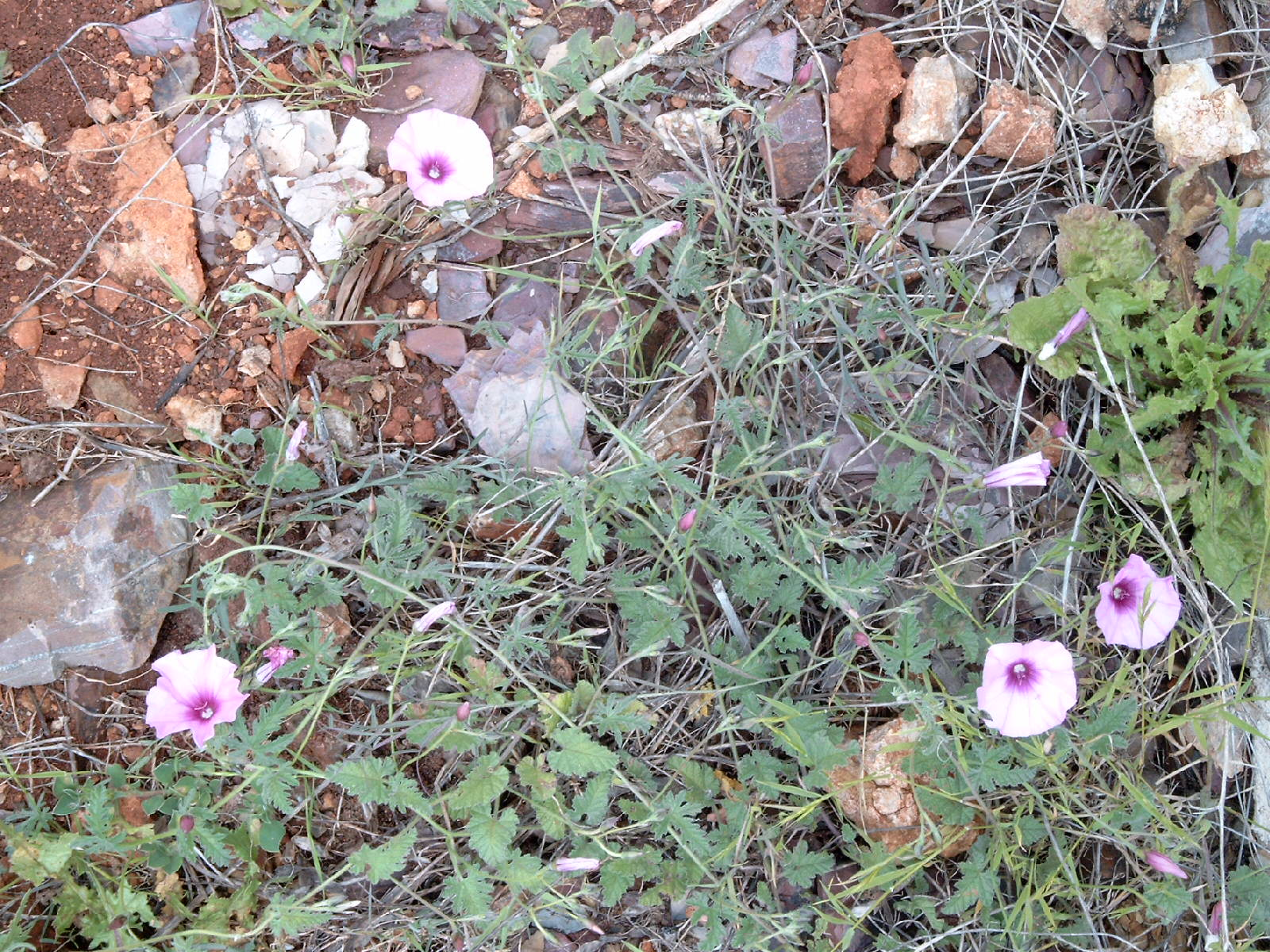 Name Convolvulus althaeoides Familiy Convolvulaceae